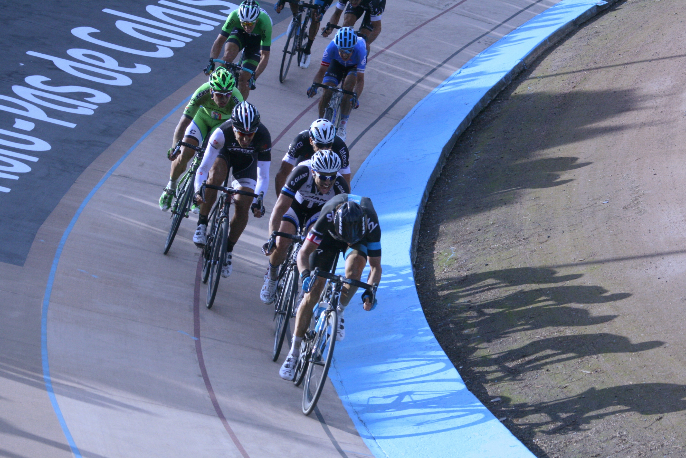 Paris-Roubaix 2014, vélodrome de Roubaix Arrivée du premier groupe